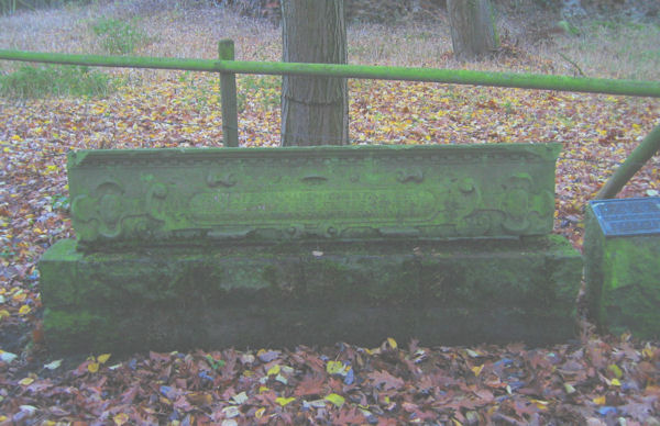 Türsturz aus der Burg Rahden in Rahden von um 1639